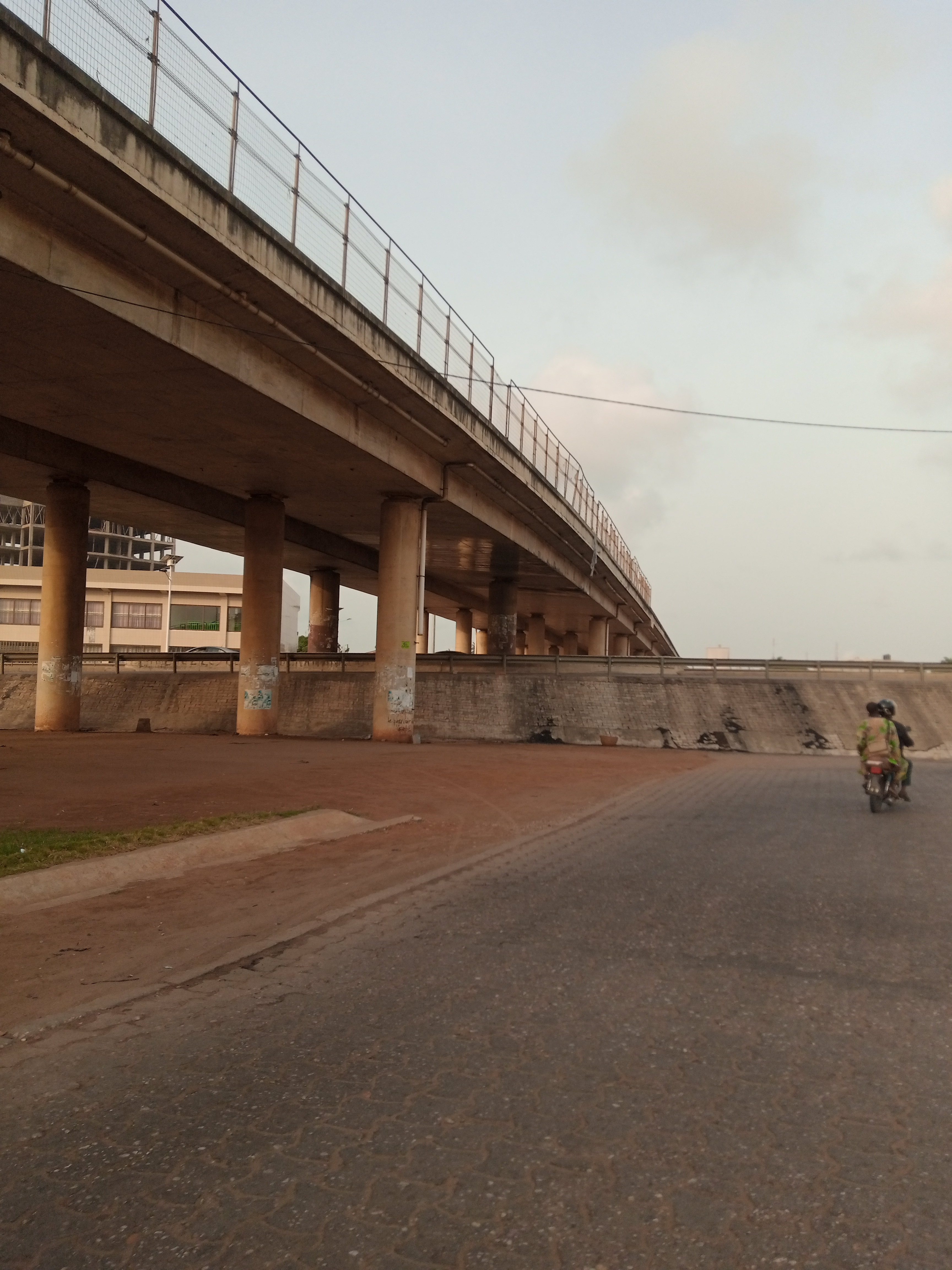 échangeur de Godomey au Bénin This is an image with the theme "Africa on the Move or Transport" from: Benin